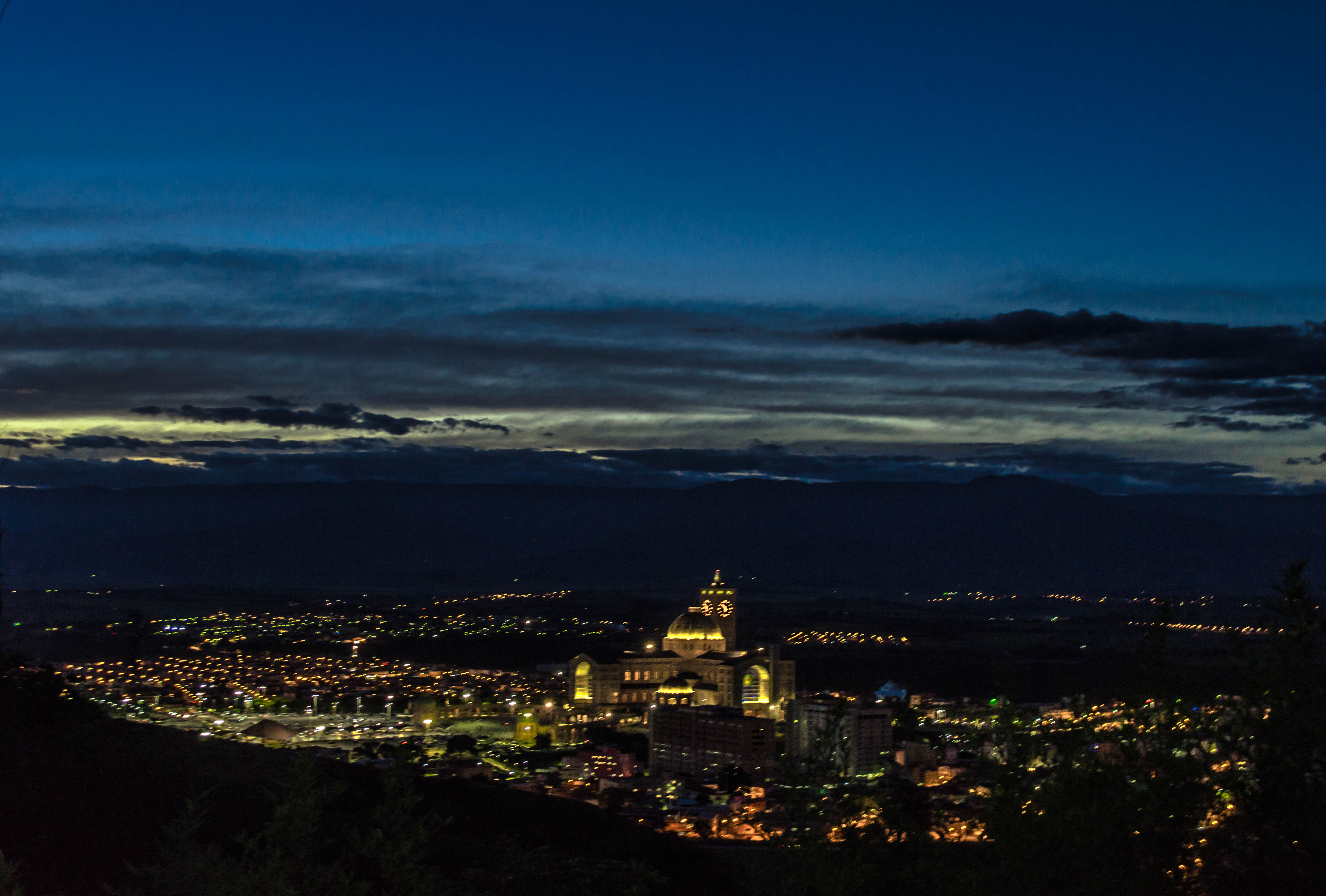 Aparecida -sp Vista de cima (Basilica)